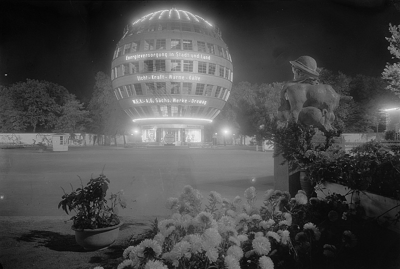 Original image description from the Deutsche Fotothek Dresden. Das beleuchtete Kugelhaus auf dem Ausstellungsgelände